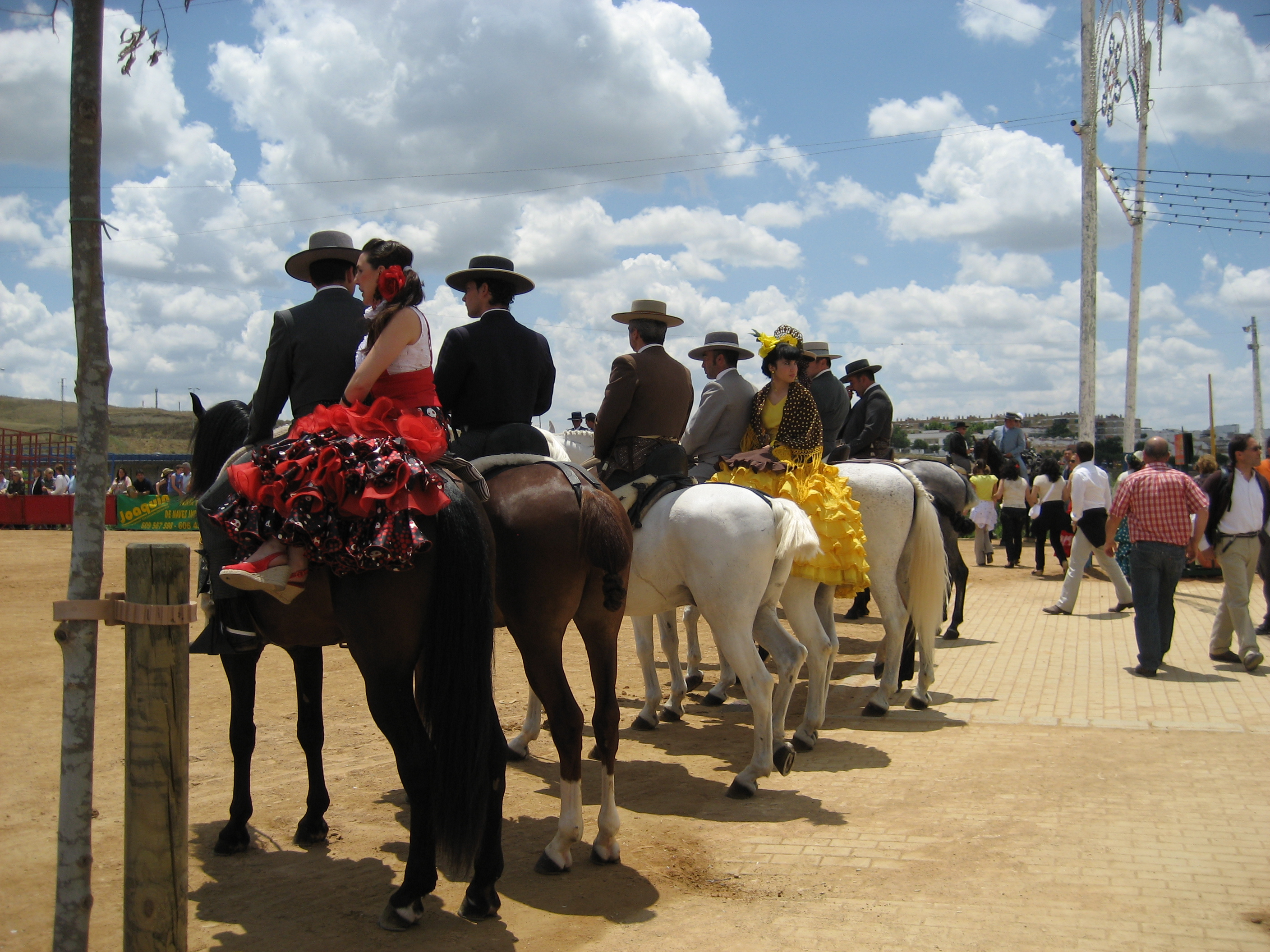 Feria de Nuestra Señora de la Salud (Córdoba, España).